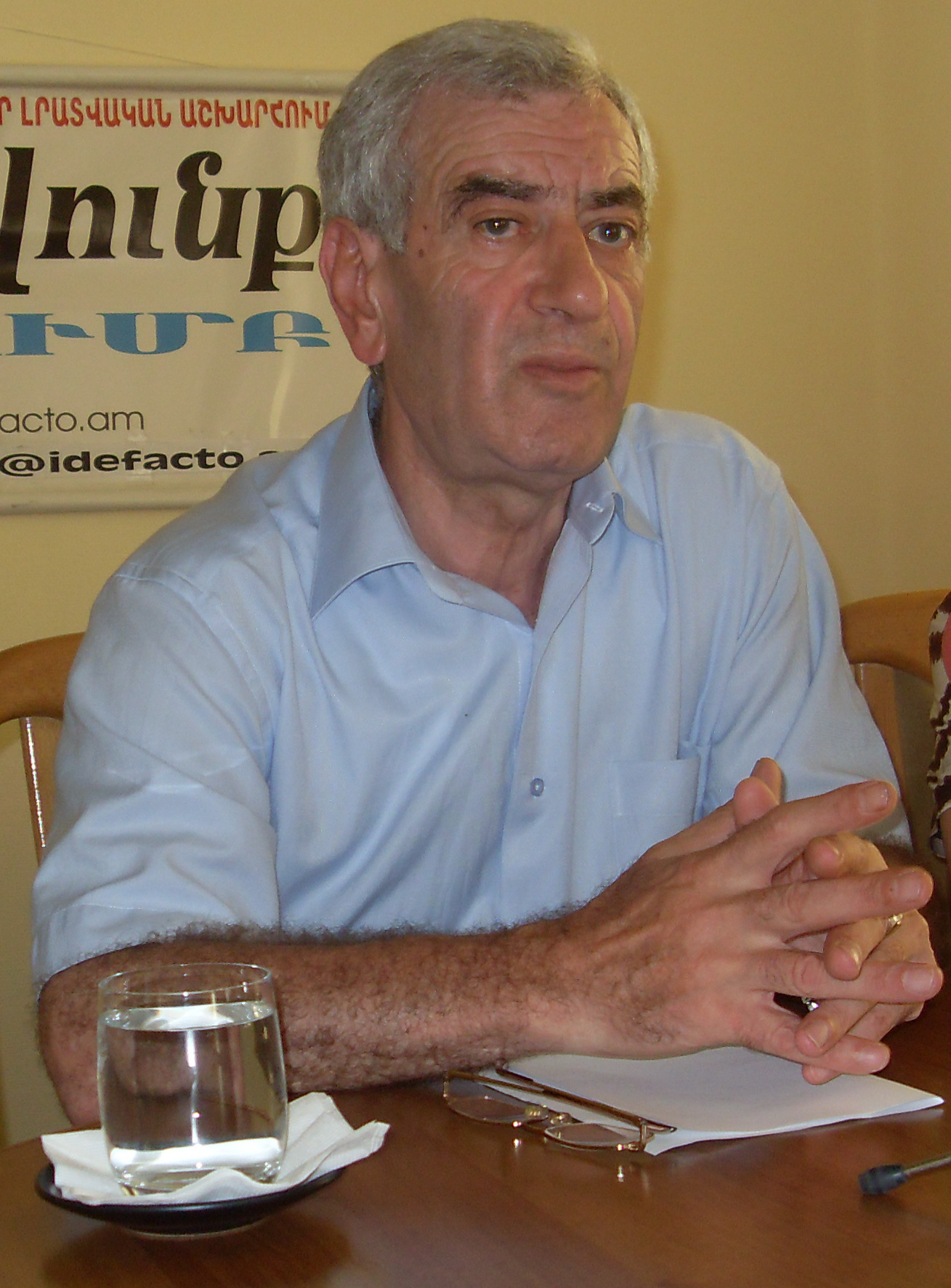 Լևոն Անանյան (1946 -2013), հայ լրագրող, հրապարակախոս, թարգմանիչ, Հայաստանի գրողների միության նախագահ (2001- 2013), Երևան, 2010